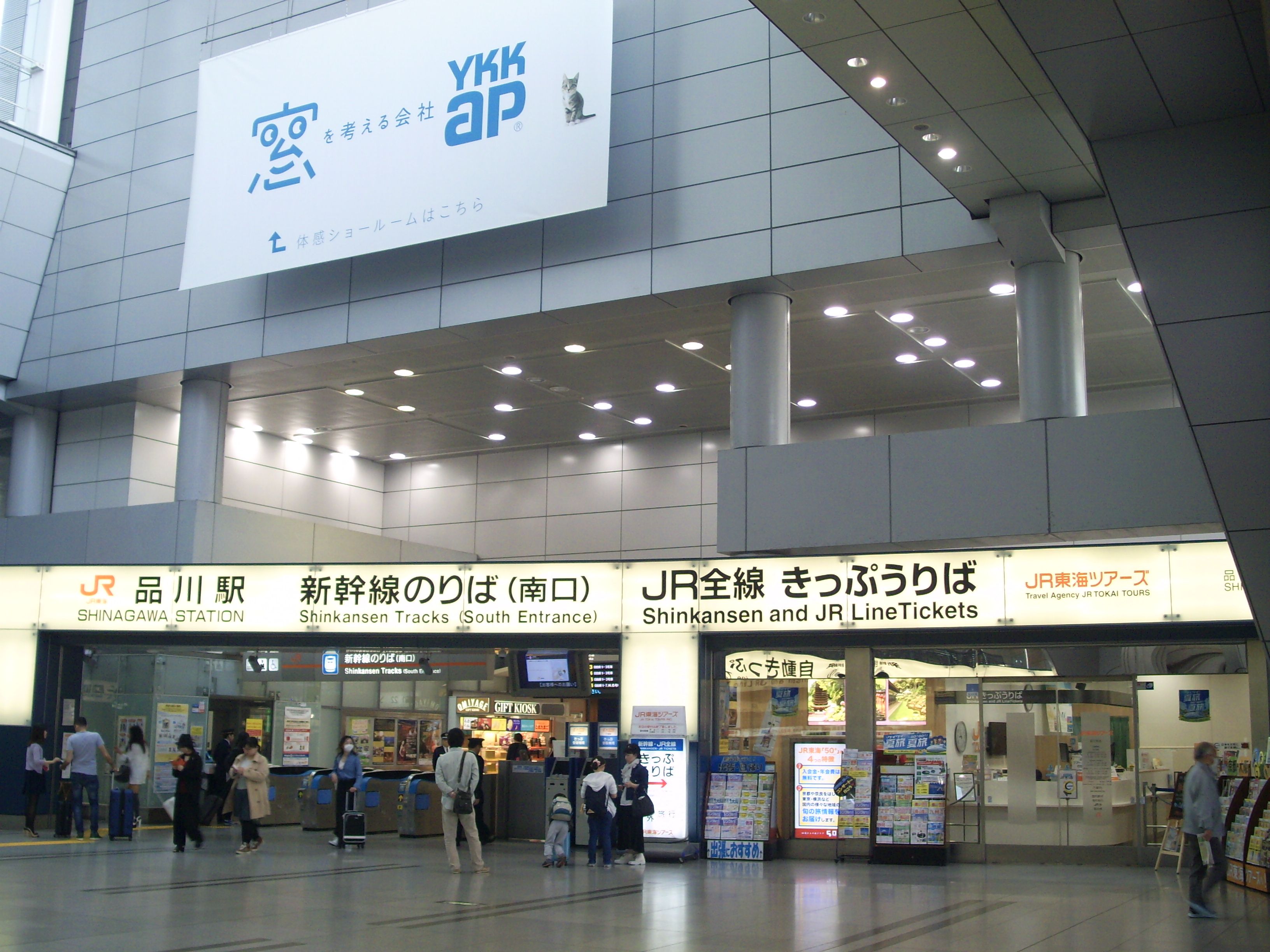 JR東海品川ビルB棟側にある東海道新幹線南口改札 JR東海ツアーズの店舗が改札脇にある ㊟カメラを起動すると日付機能が出荷時のものに初期化されるため、ファイル履歴の撮影・投稿日時とメタデータの原画像データの生成日時が異なります